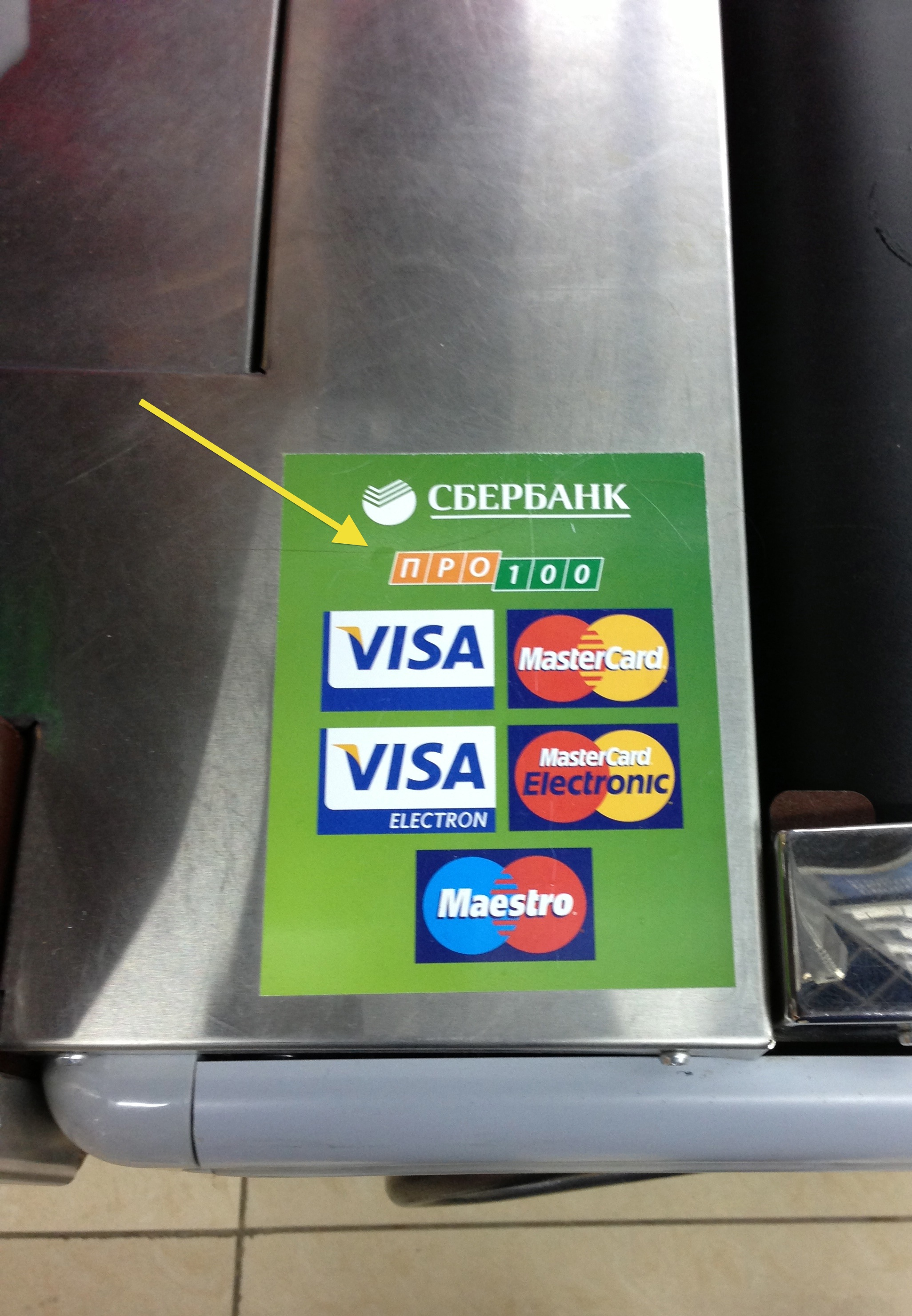 Фотография наклейки на кассе магазина с указанием принимаемых платёжных систем